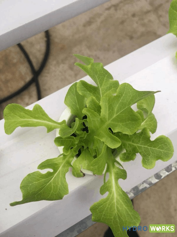 Trồng rau bằng phương pháp thủy canh